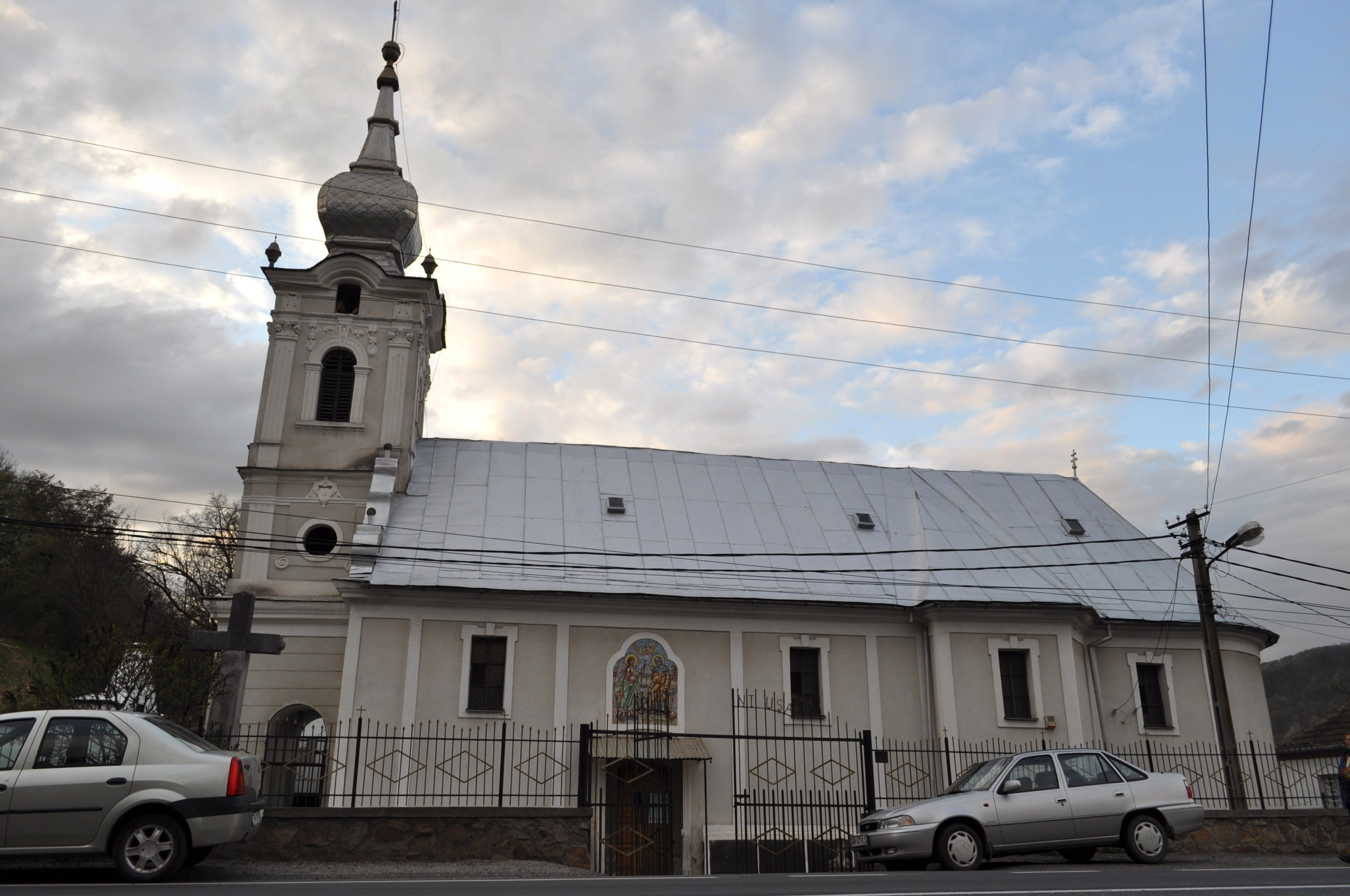 Biserica "Bunavestire" din Lipova, județul Arad